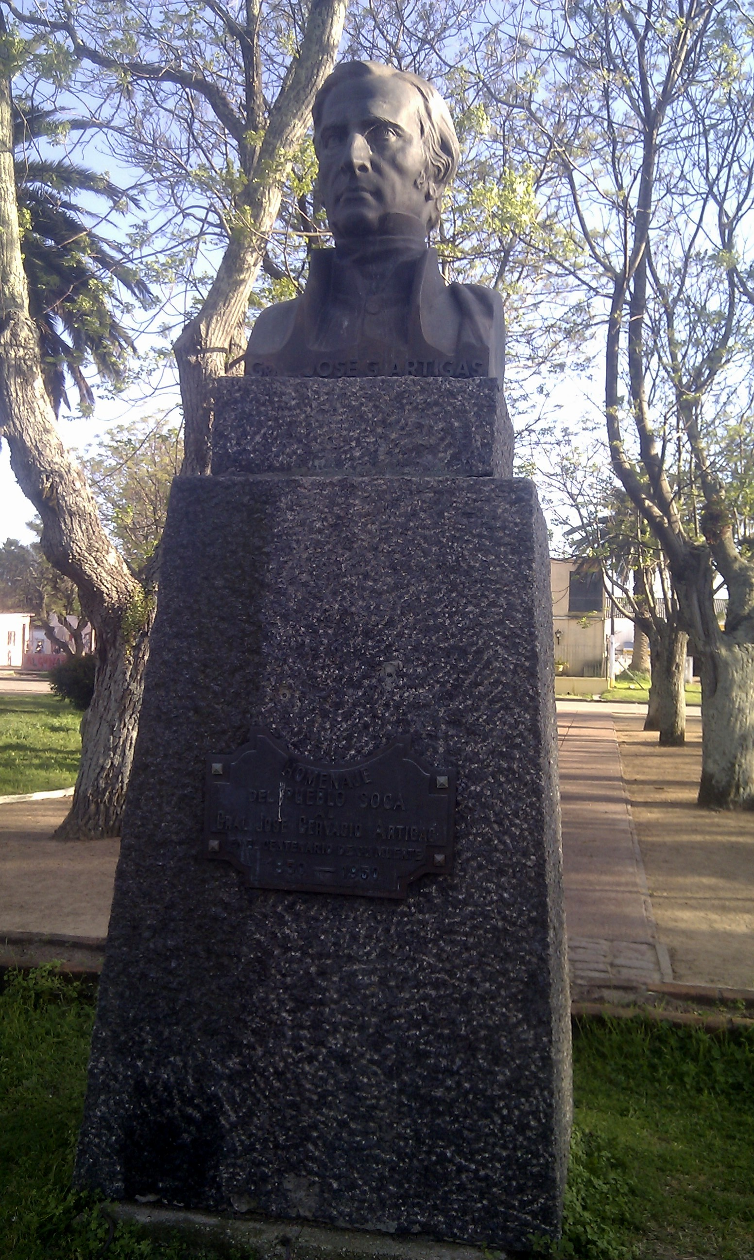 Monumento a Artigas en Plaza Pública de la ciudad de Soca